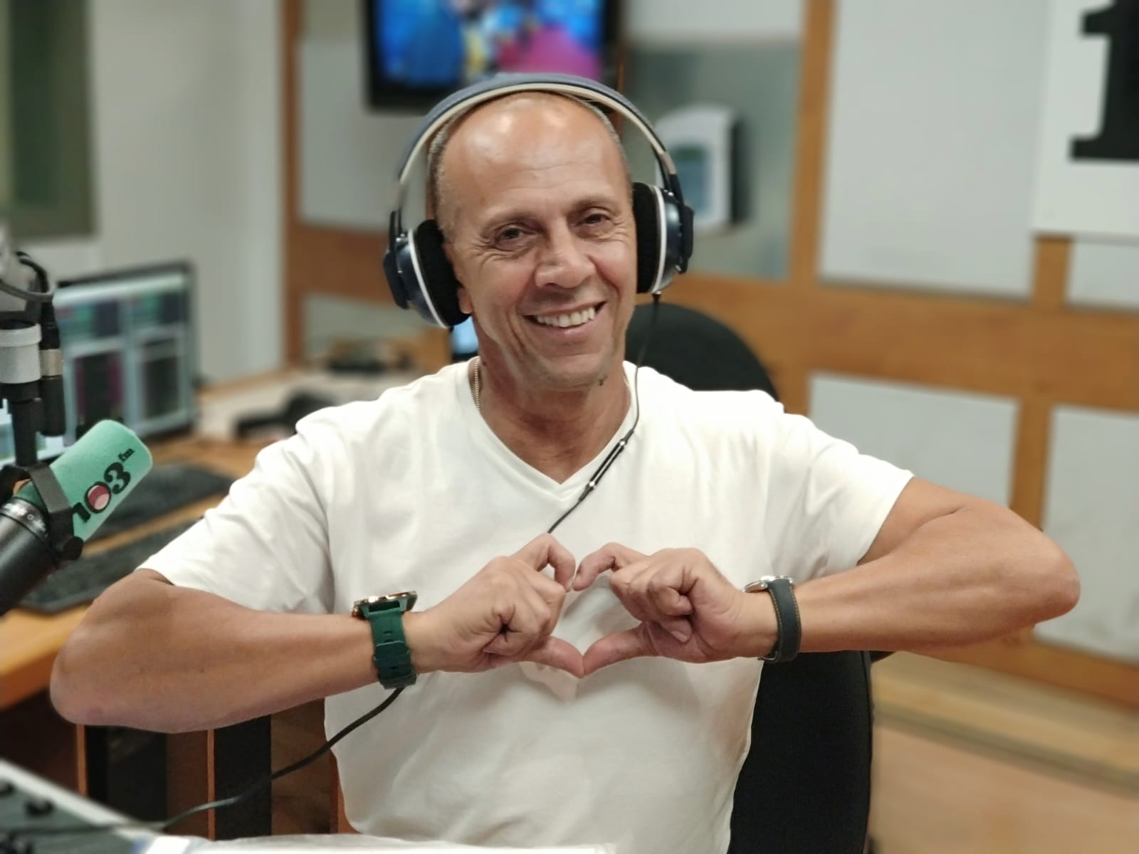 דידי הררי באולפן 103fm // צילום: יניב מורוזובסקי/103fm